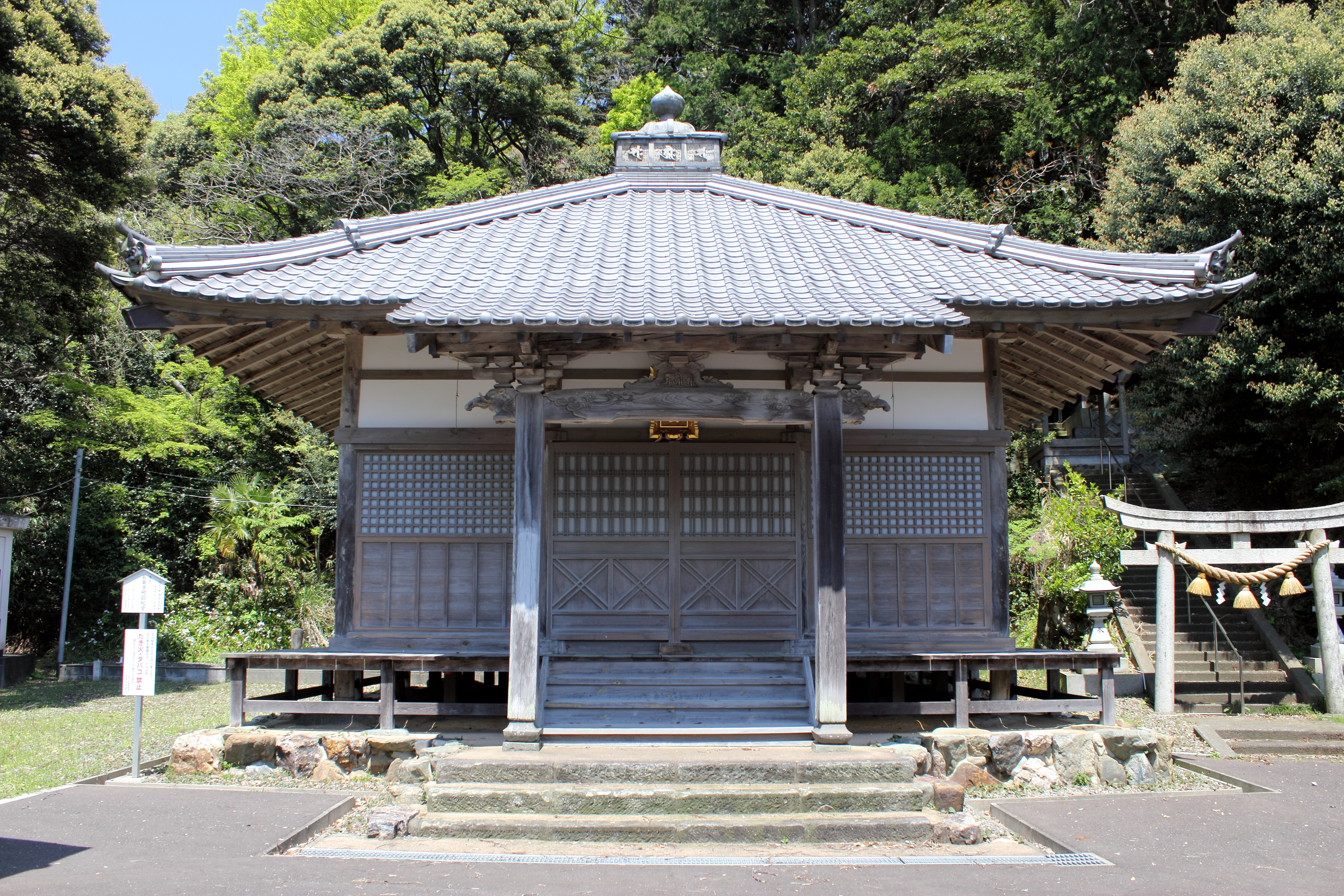 福井県大飯町にある長楽寺